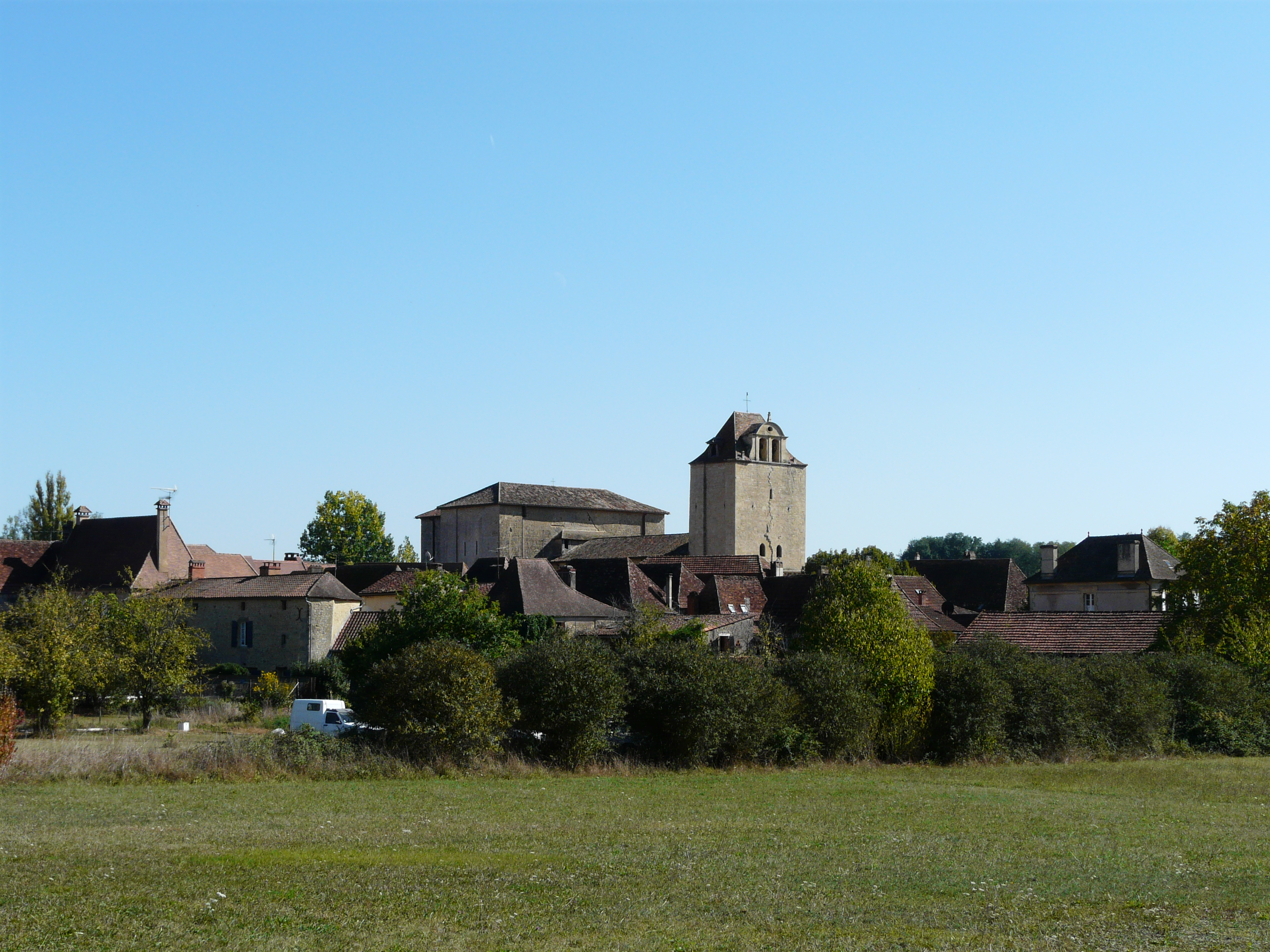 Le village de Trémolat vu depuis le nord-ouest, Dordogne, France.